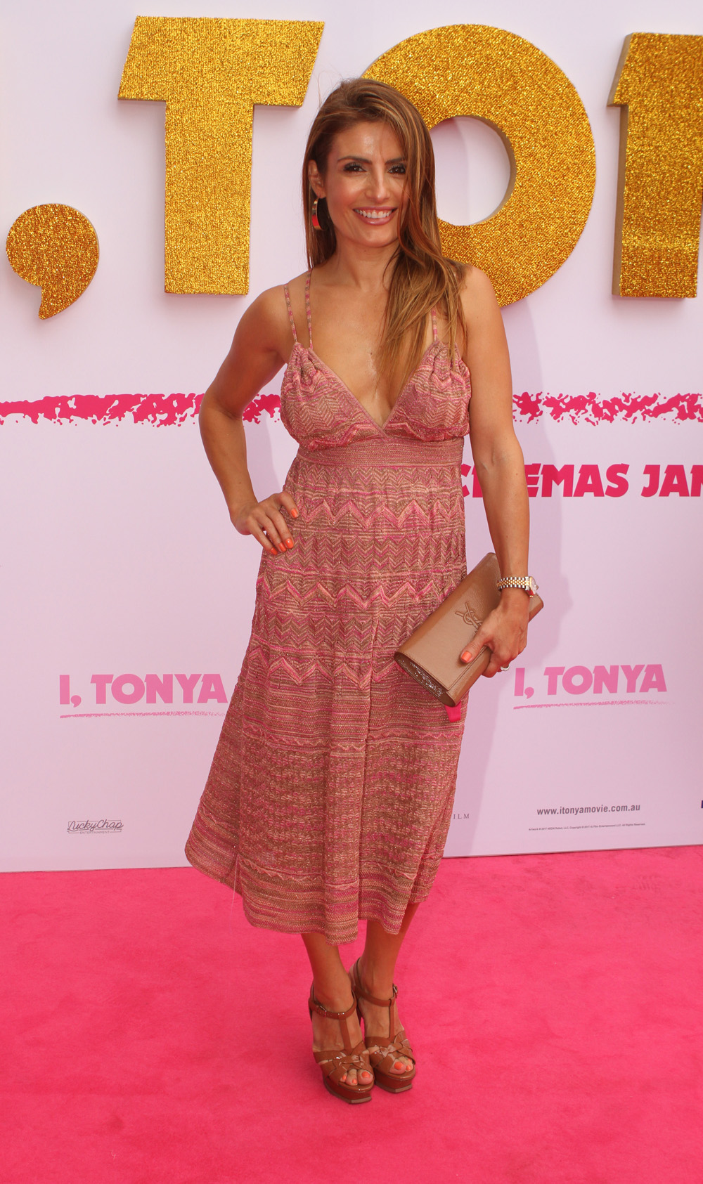 Ada Nicodemou